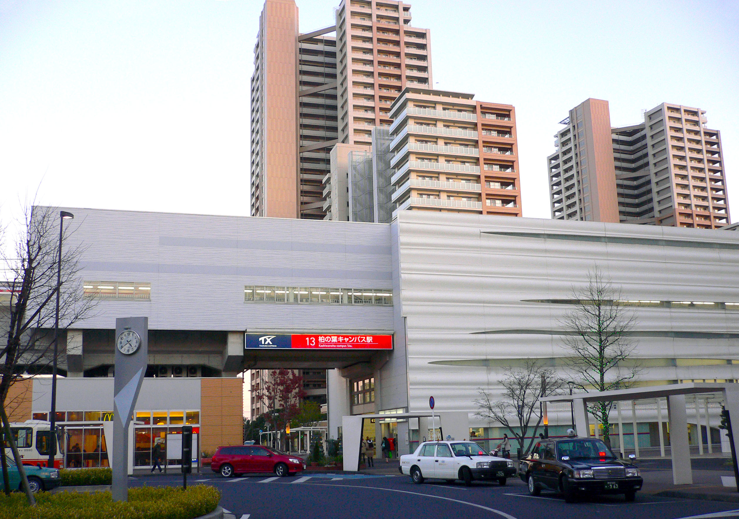 つくばEx.柏の葉キャンパス駅